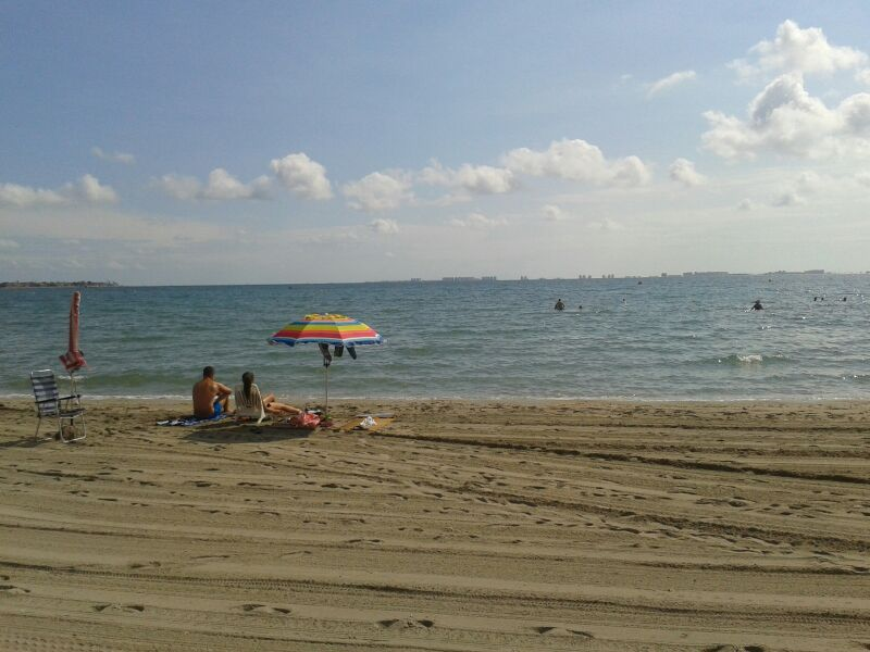 playa del paseo Manzanares